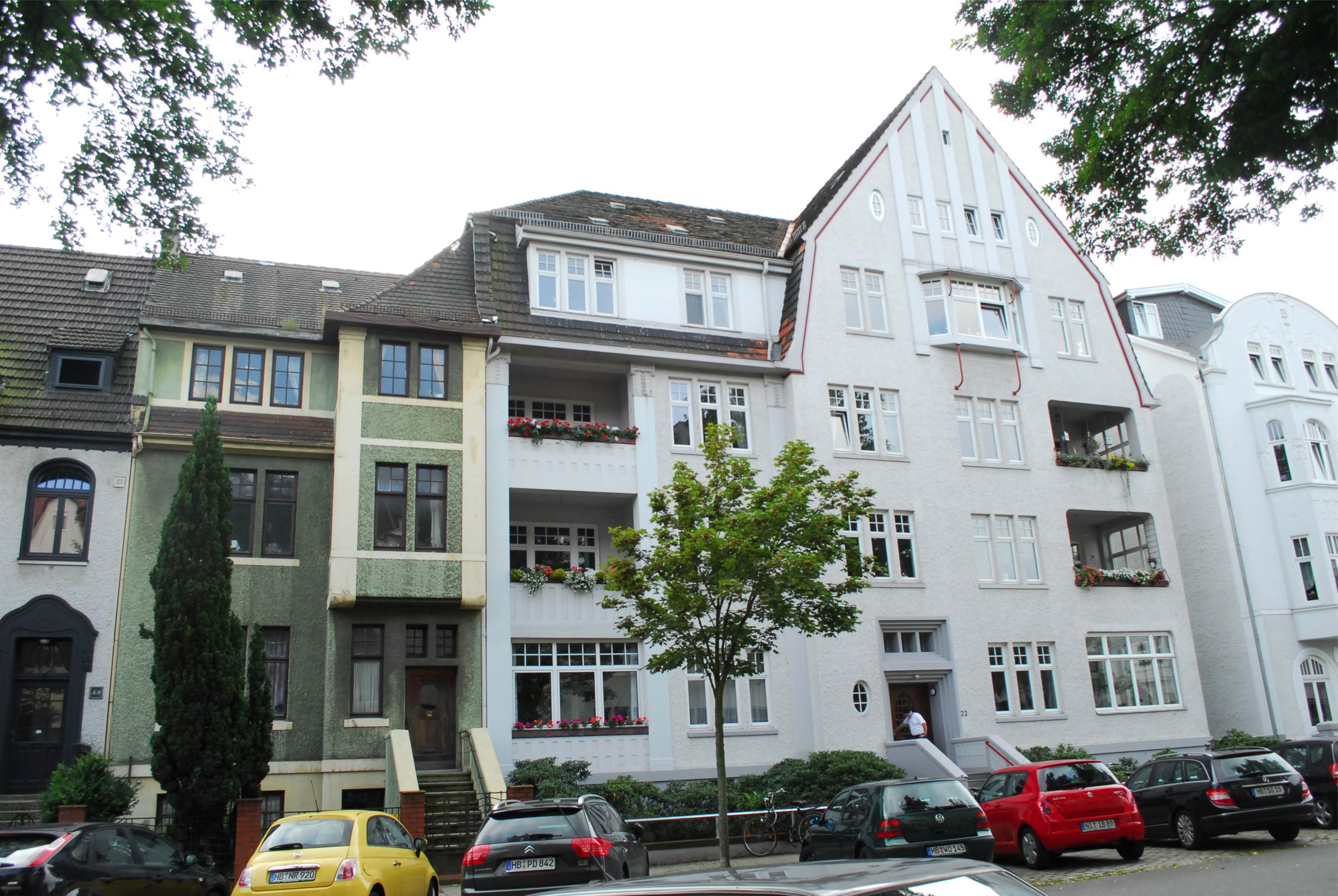 Wohnhausgruppe in Bremen, Hohenlohestraße 20, 22.Die Denkmalgruppe ist ein geschütztes Kulturdenkmal in der Freien Hansestadt Bremen, mit der Nr. 1408 beim Landesamt für Denkmalpflege registriert.